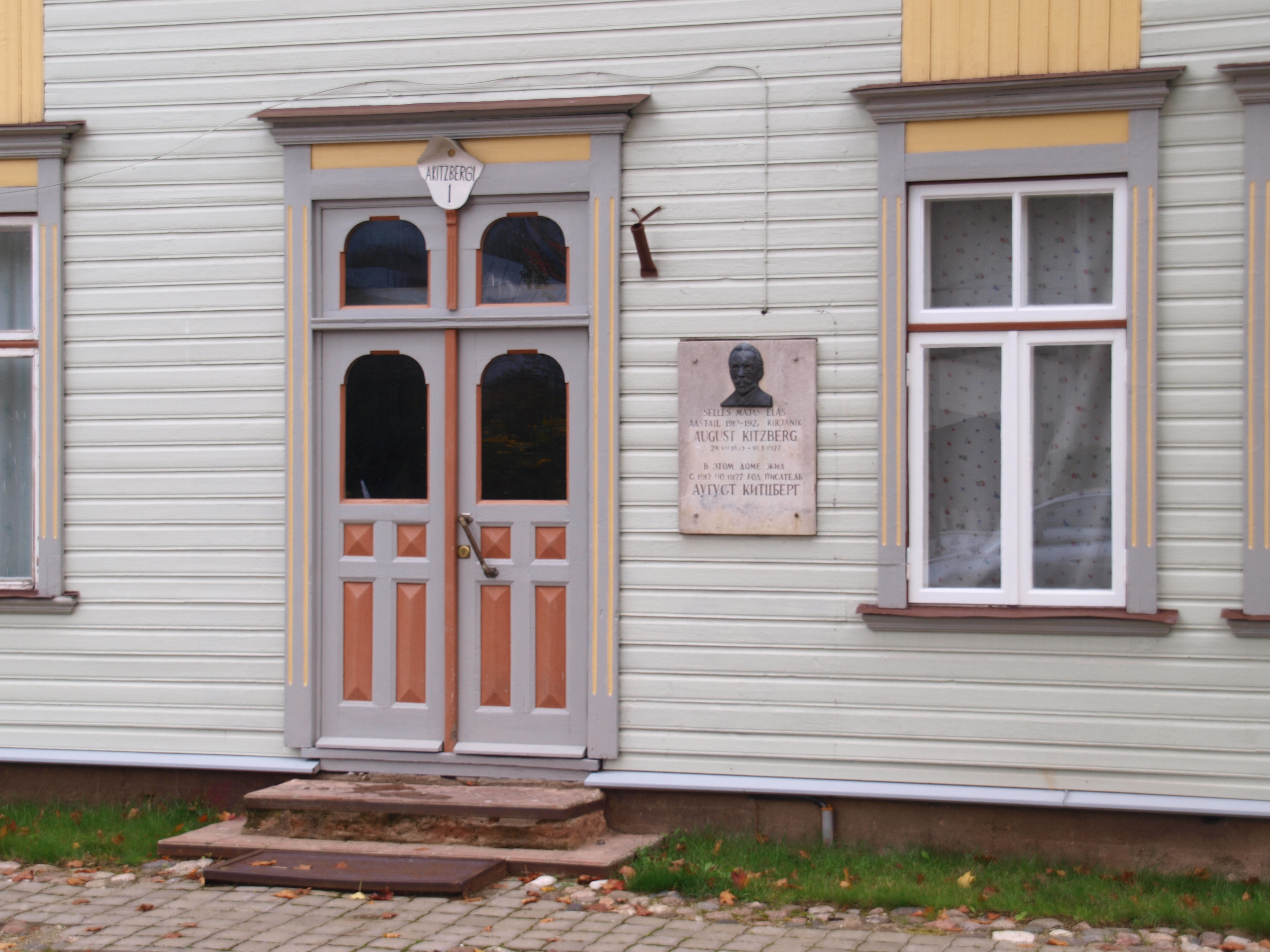 Puitelamu 1907-1914, kus aastail 1912-1927 elas August Kitzberg